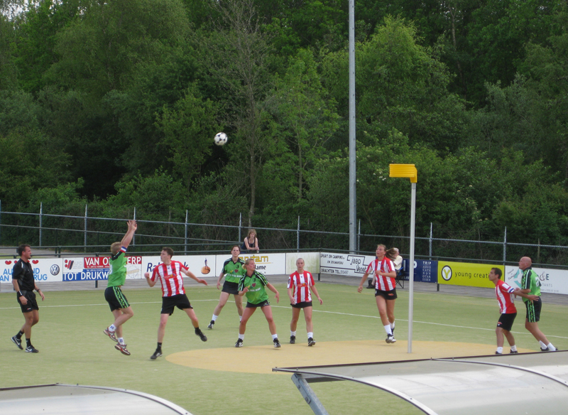 KV Drachten tegen Fortuna uit Delft